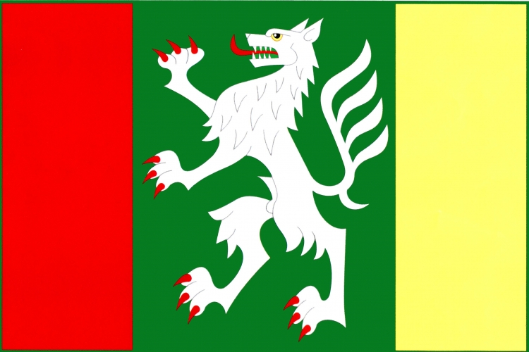 vlajka, Dobřínsko, okres Znojmo